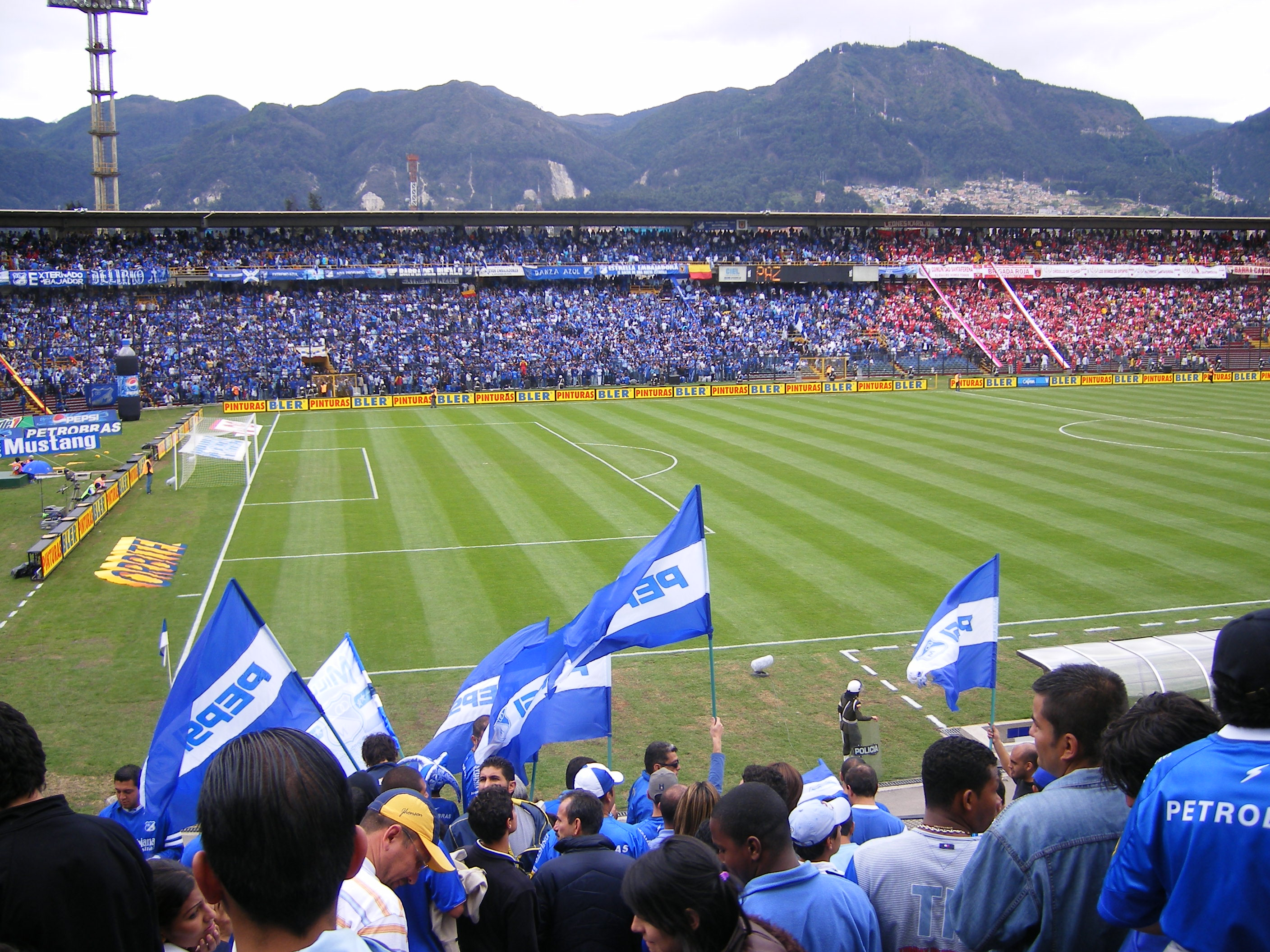 Estadio El Campín, ubicado sobre el Carrer 30, és el principal estadio de futbol de la ciudad y el país (tribuna occidental).